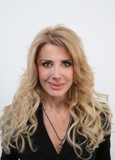 Gabriella Carlucci, politica italiana